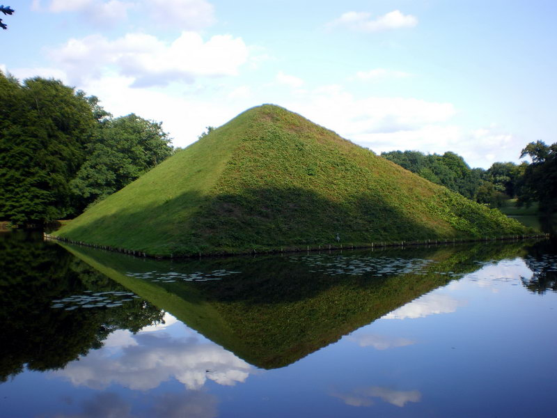 Branitzer Park, Pyramide